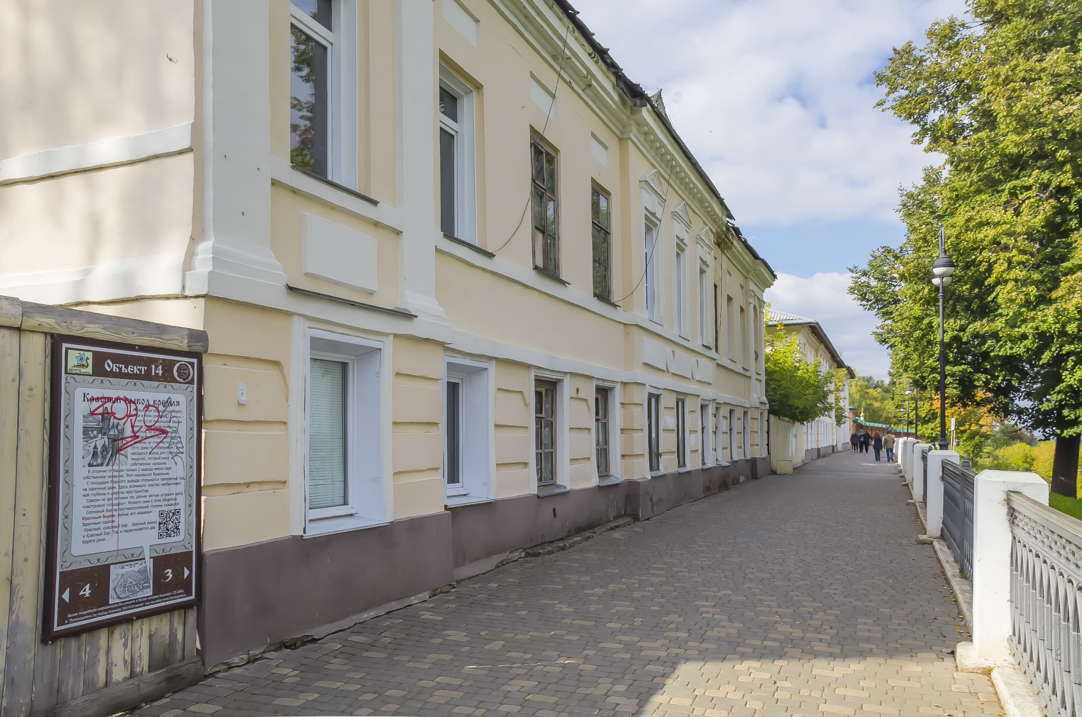 Жилой дом служителей кафедрального собора. Ансамбль застройки набережной: набережная Грина, 19, Киров, Кировская область